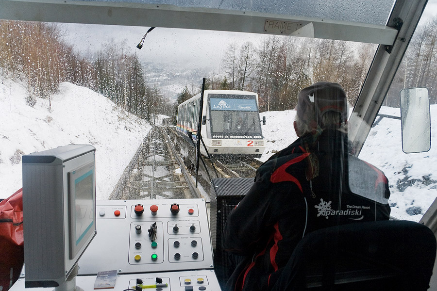 'Arc en Ciel' funicular railway